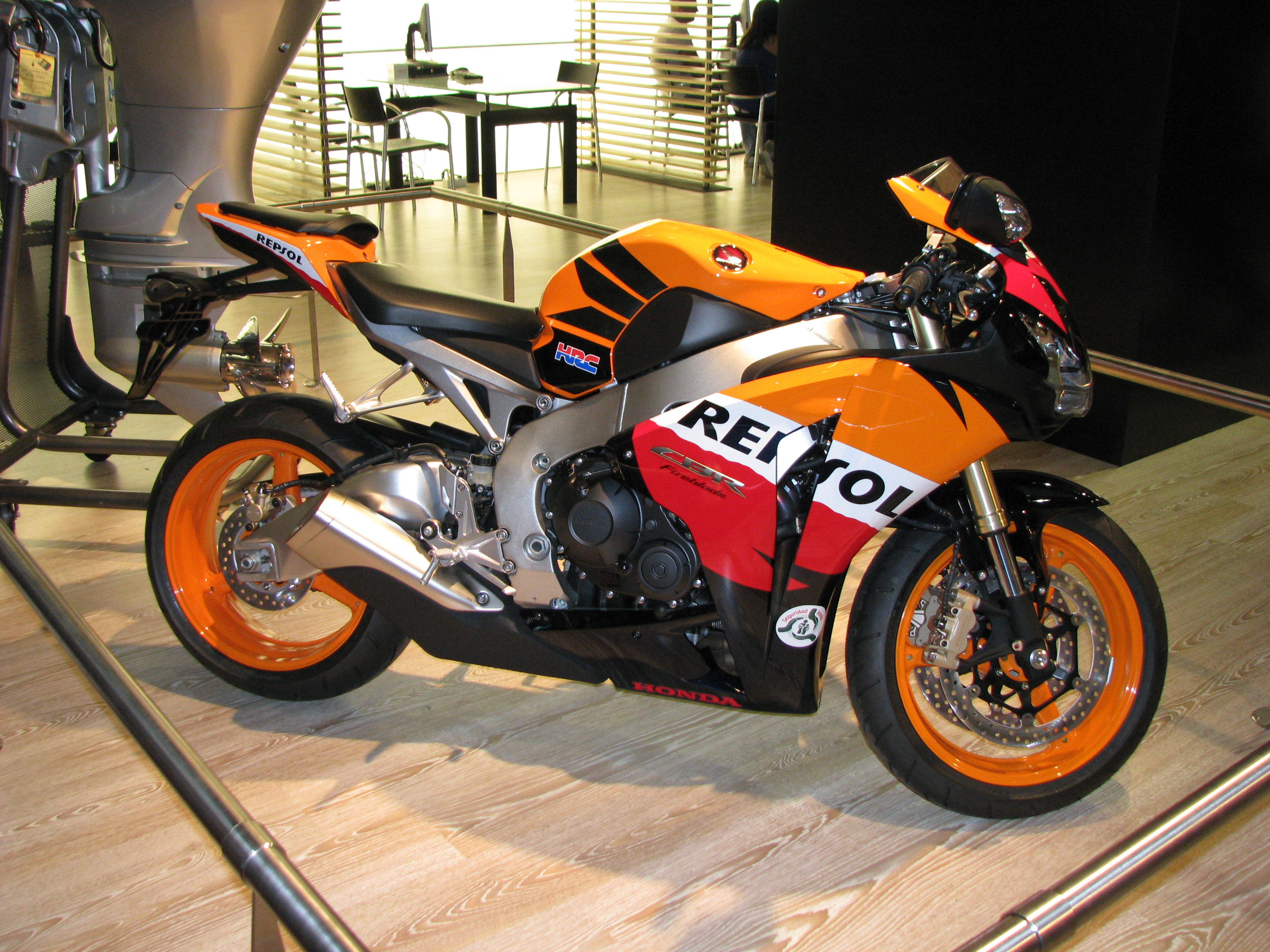 Honda CBR 1000RR Fireblade Repsol Special Edition en el Salón Internacional del Automóvil de Barcelona de 2009.